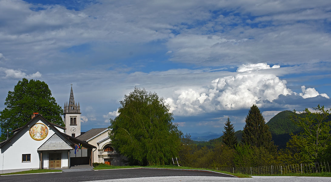 Sv. Lenart nad Lušo